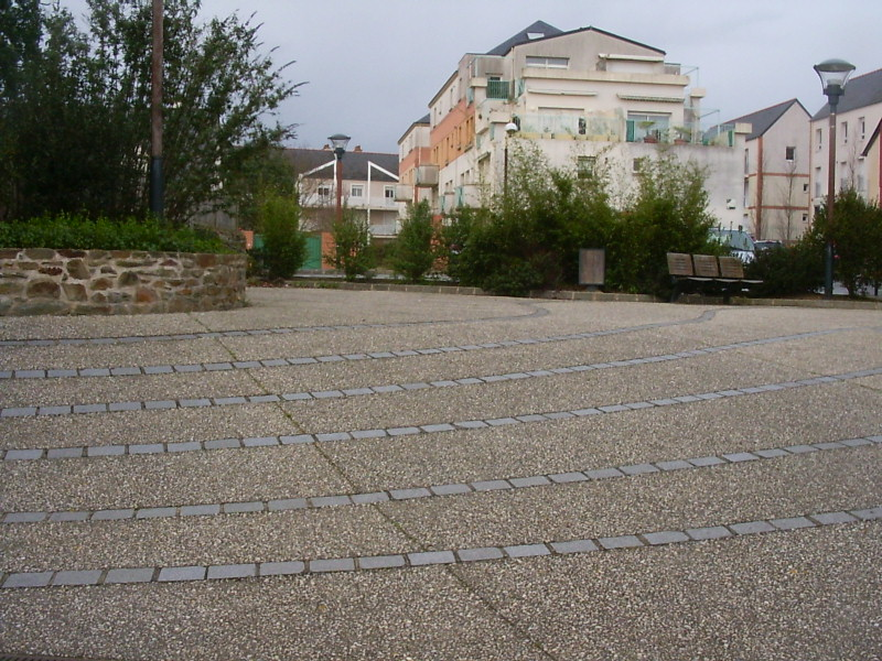 Aménagement d'une placette à Chantepie, Avenue André-Bonnin